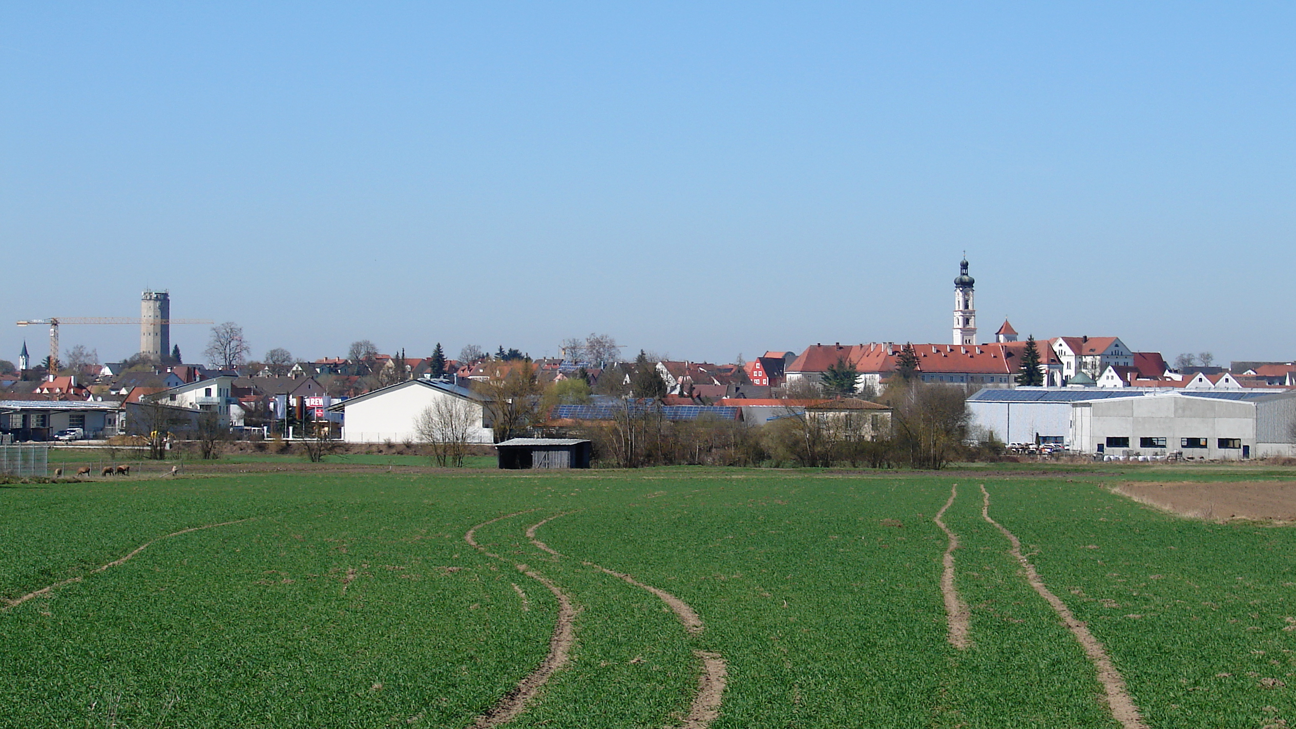 Geisenfeld ist eine Stadt im oberbayerischen Landkreis Pfaffenhofen an der Ilm.